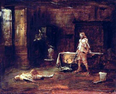 Munkácsy Mihály: Párbaj (olajfestmény)